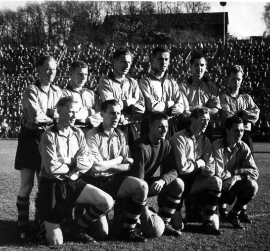 Sandefjord Ballklubbs cupfinalelag 1957